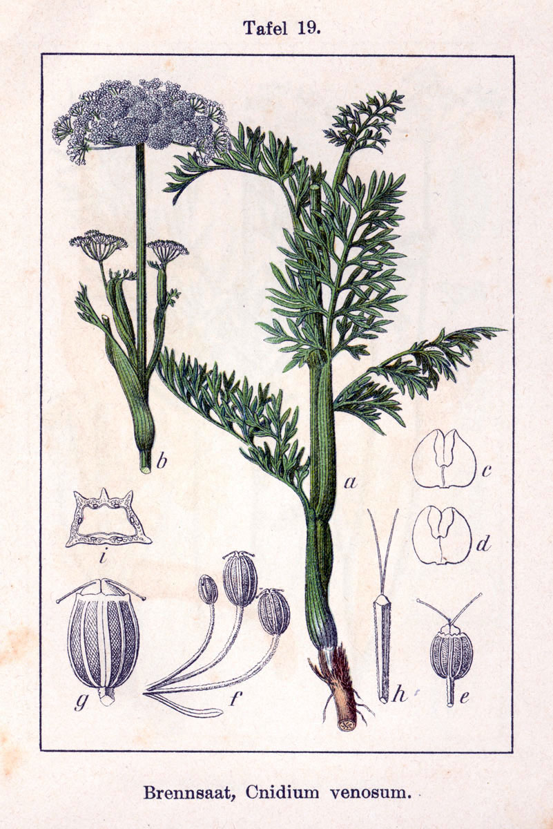 Cnidium dubium (Schkuhr) Thell., syn. Cnidium venosum (Hoffm.) W. D. J. Koch , nom. illeg. Original Description Brennsaat, Cnidium venosum